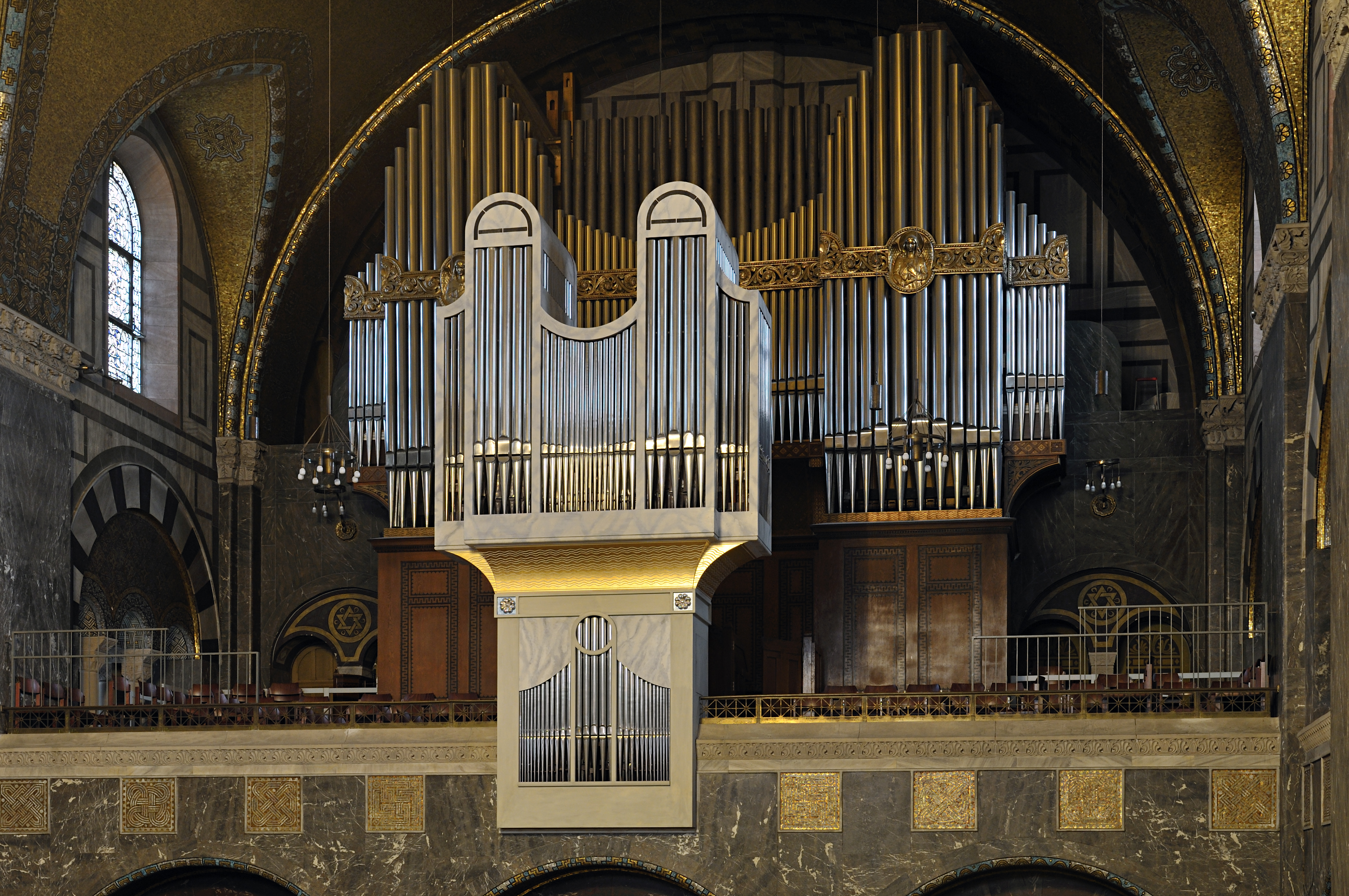 Erlöserkirche Bad Homburg: Orgelprospekt von der Kanzel